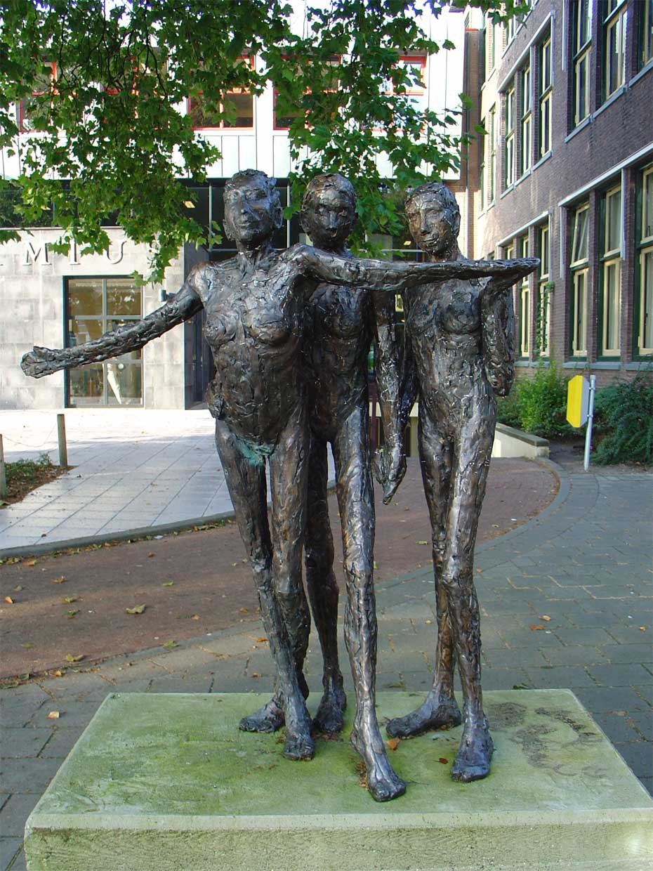 Standbeeld Op weg door Anita Franken op het plein van de scholengemeenschap Ubbo Emmius Stationslaan Stadskanaal